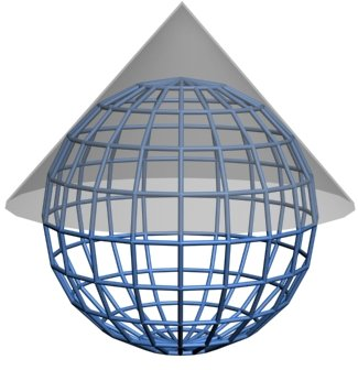 Schéma illustrant la projection conique (cartographie). Infographie par Traroth sous GFDL.